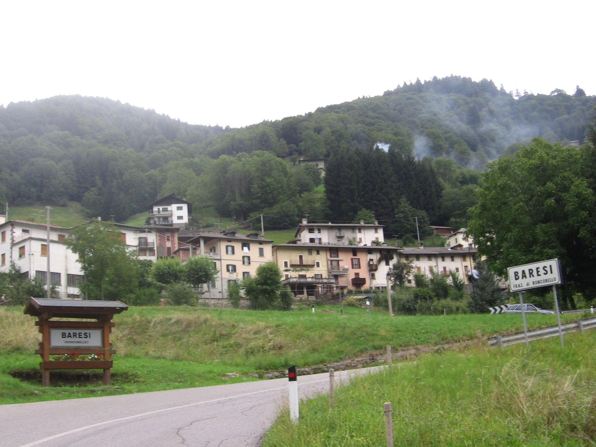 Vista di Baresi, frazione del comune di Roncobello